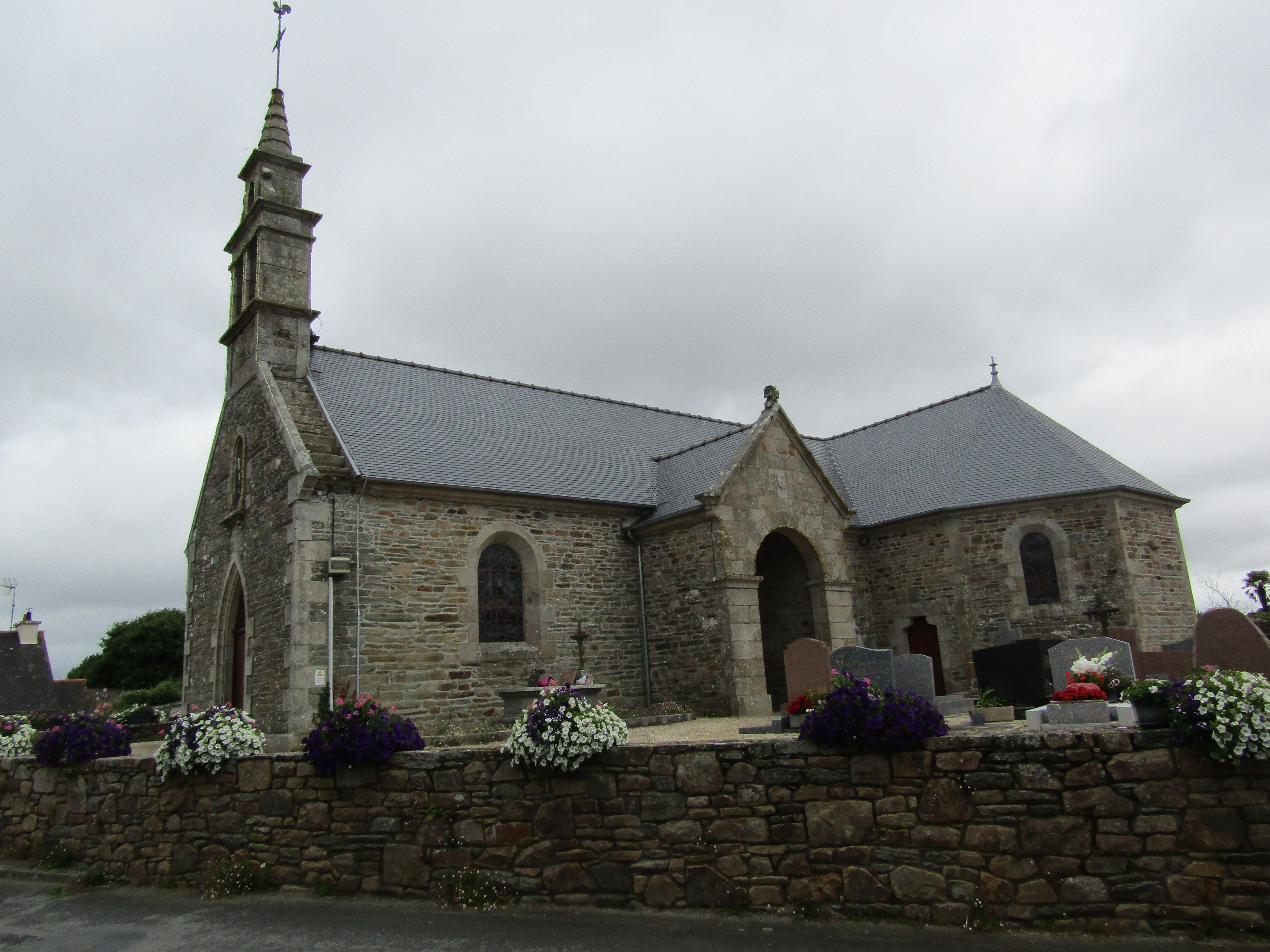 L'Eglise Saint-Zény de Trézény